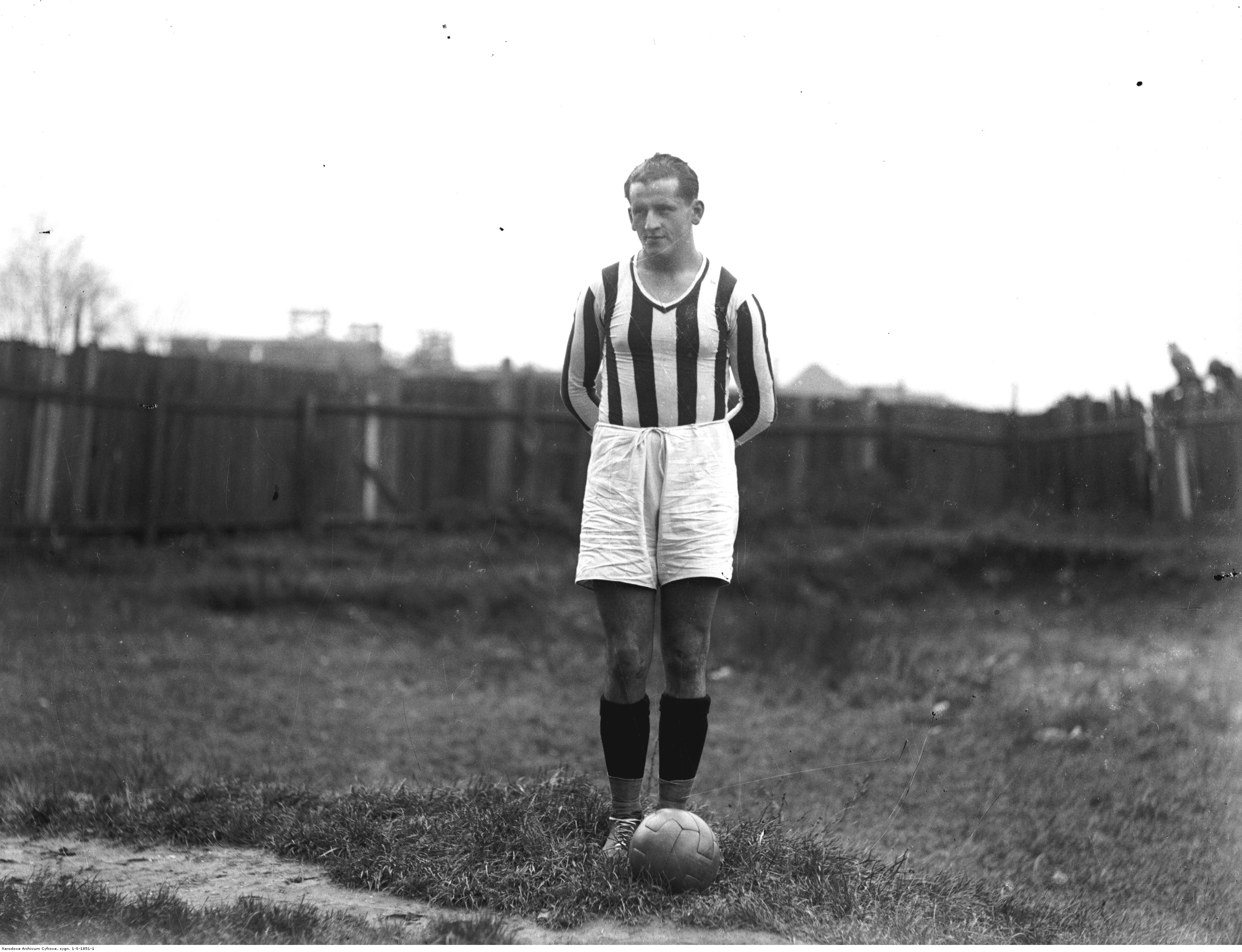 Karol Kossok, piłkarz klubu Cracovia. Fotografia sytuacyjna.